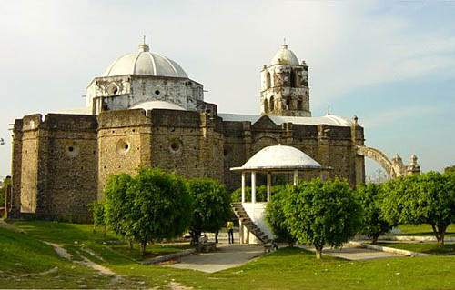 La Iglesia de Santiago Apóstol de Temapache